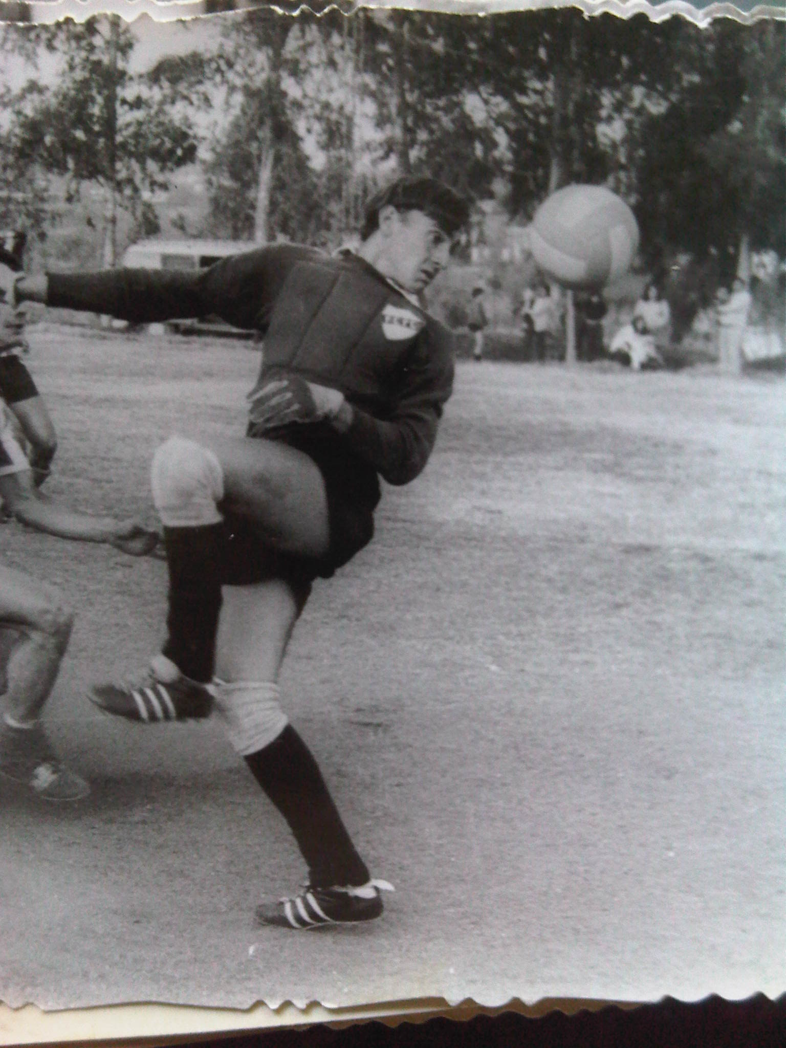 Eduardo Pierri marcando de cabeza en porteria rival